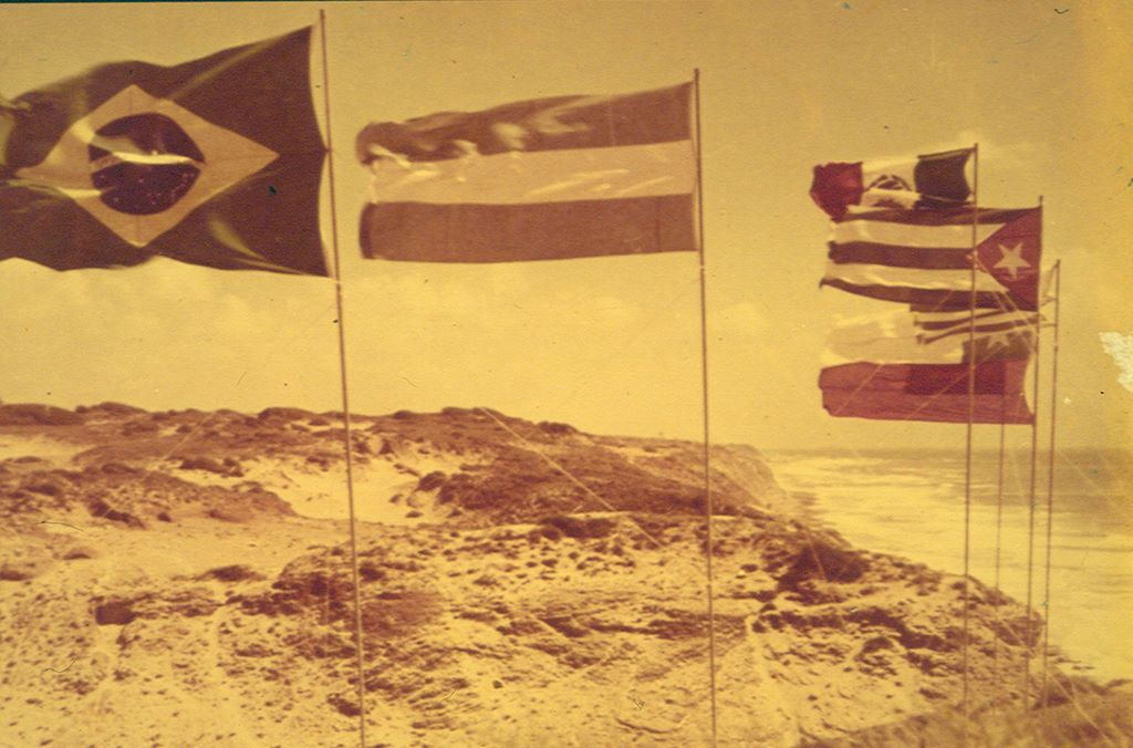 מצוק געש, יום העלייה לקרקע, דגלי המדינות שמהם הגיעו המייסדים kibbutz Gaash first day (Israel 1951), flags of countries that the first people came from